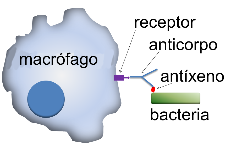 acción das opsoninas